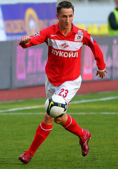 Vladimir Bystrov